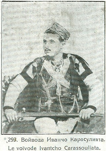 Портрет на Иванчо Карасулията.